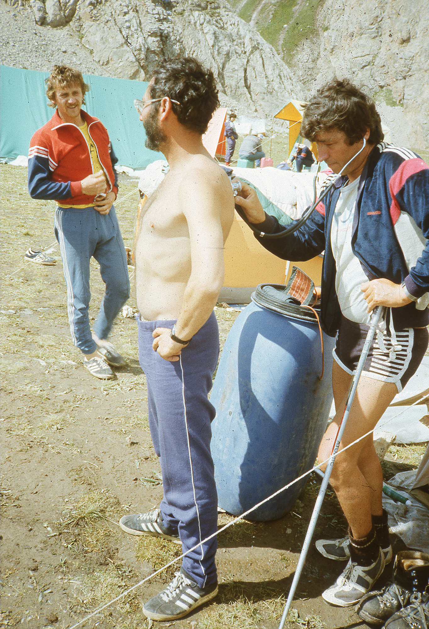 Boriss Slepikovski